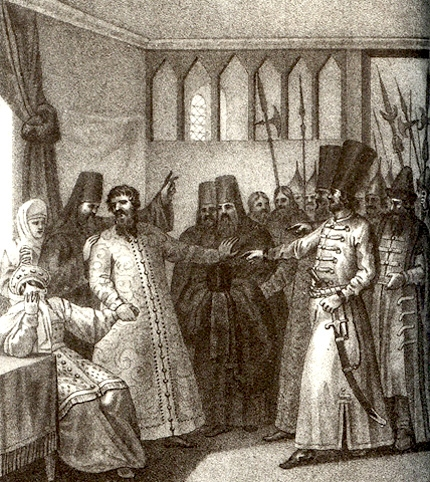 Это репродукция картины Бориса Чорикова Пострижение Василия Шуйского в монахи, которое иллюстрирует событие 1610 года - свержение Василия Шуйского и установление Семибоярщины.